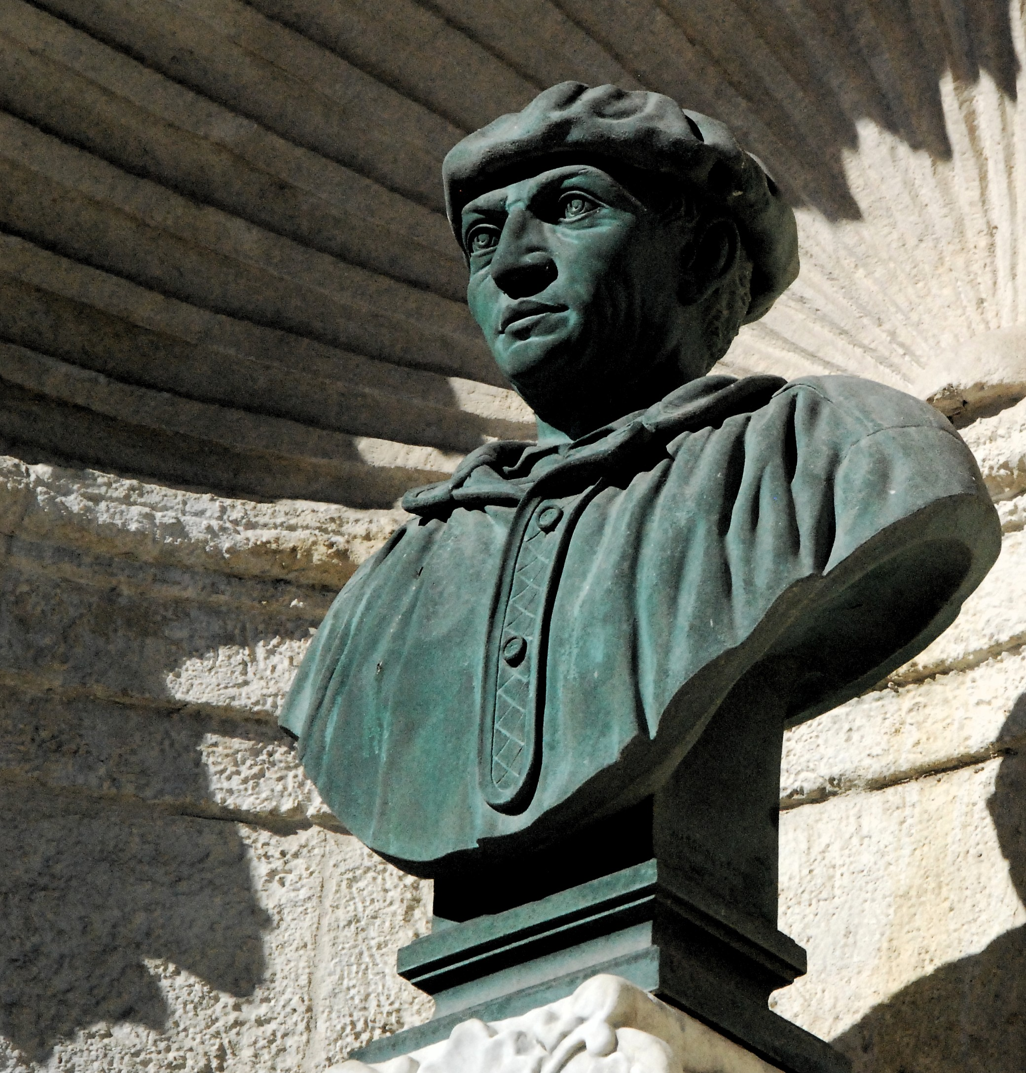 Aita Mari arrantzalearen eskultura Donostiako portuan, albotik